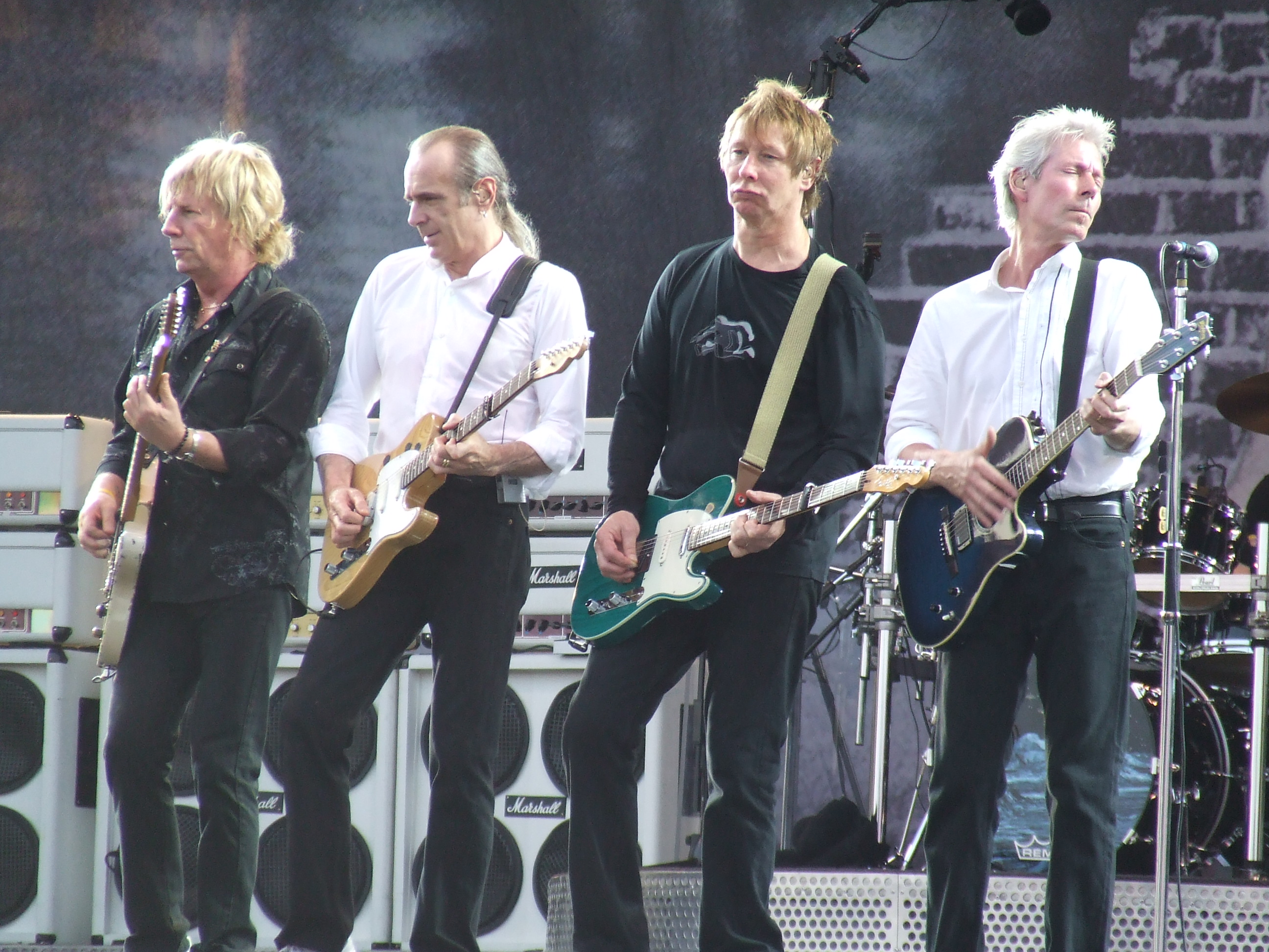 Dit is een zelfgemaakte opname, gefotografeerd op 9 juni 2006 op het Arrow Rock festival 2006 in Lichtenvoorde. De gebruikte camera is een Fuji s5600. Paulus_2 12 jun 2006 11:35 (CEST)